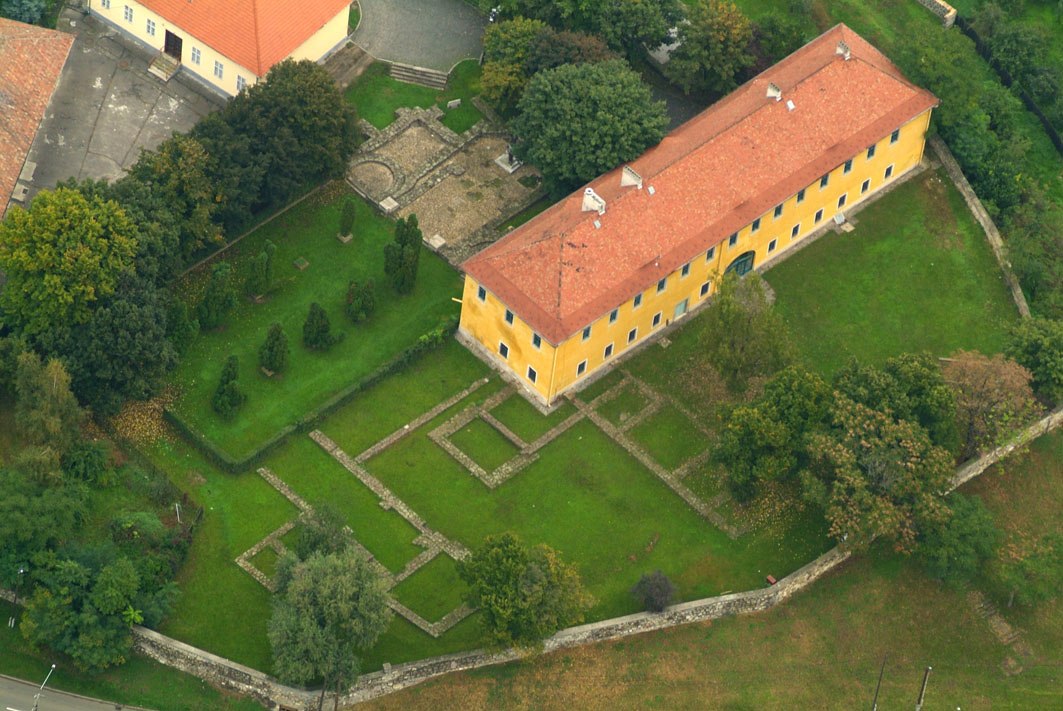 Cistercian Convent - Pásztó - Hungary - Europe